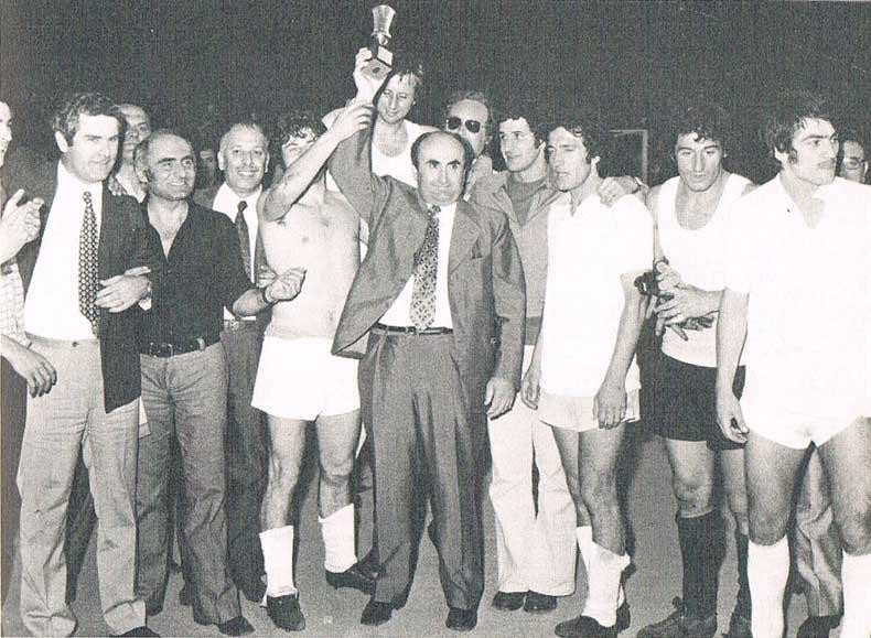 Il presidente Orfeo Pianelli, artefice della rinascita del Torino negli anni 1960 e 1970, festeggia con la squadra la conquista della Coppa Italia 1970-71.